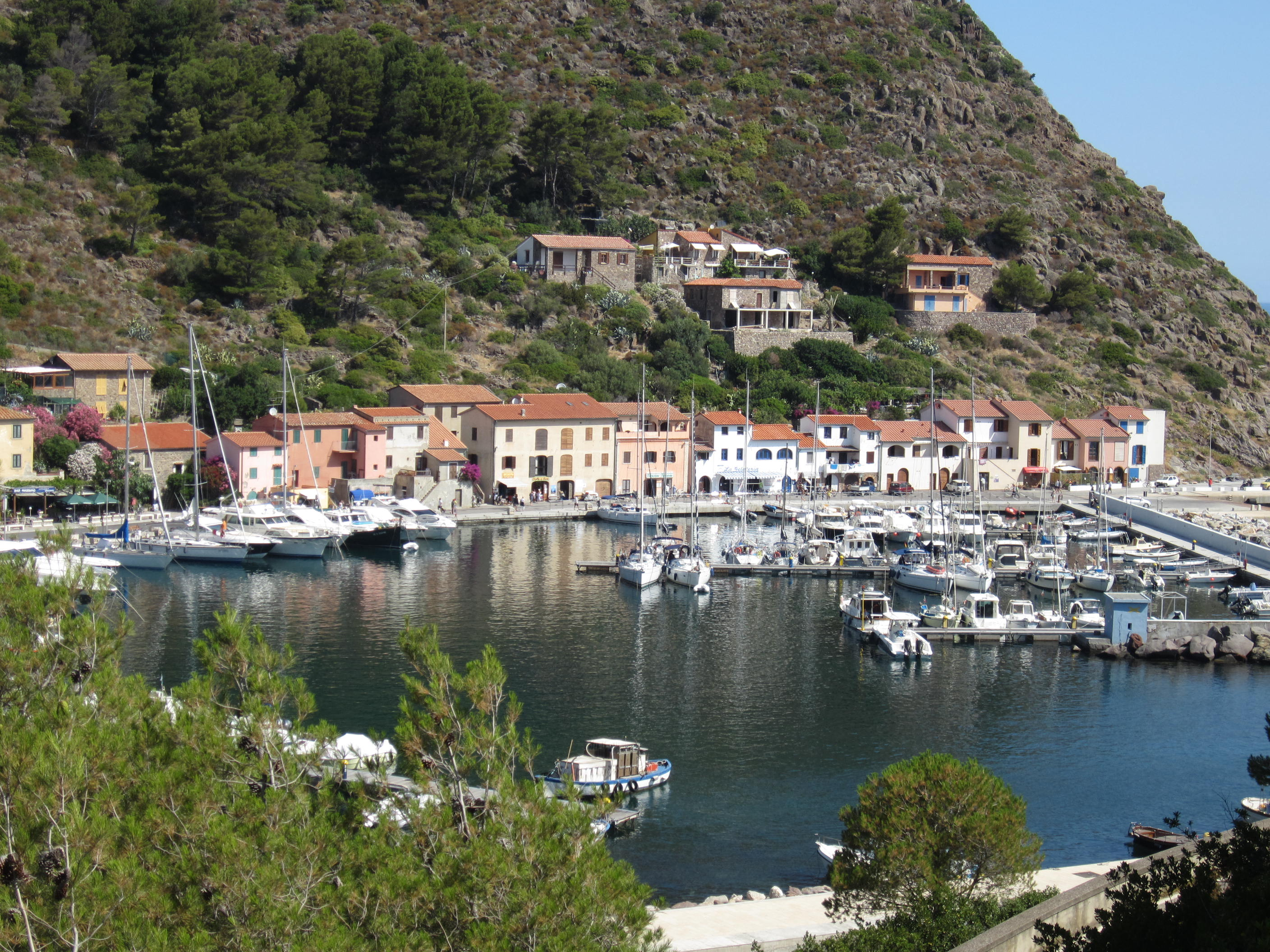 Porticciolo di Capraia